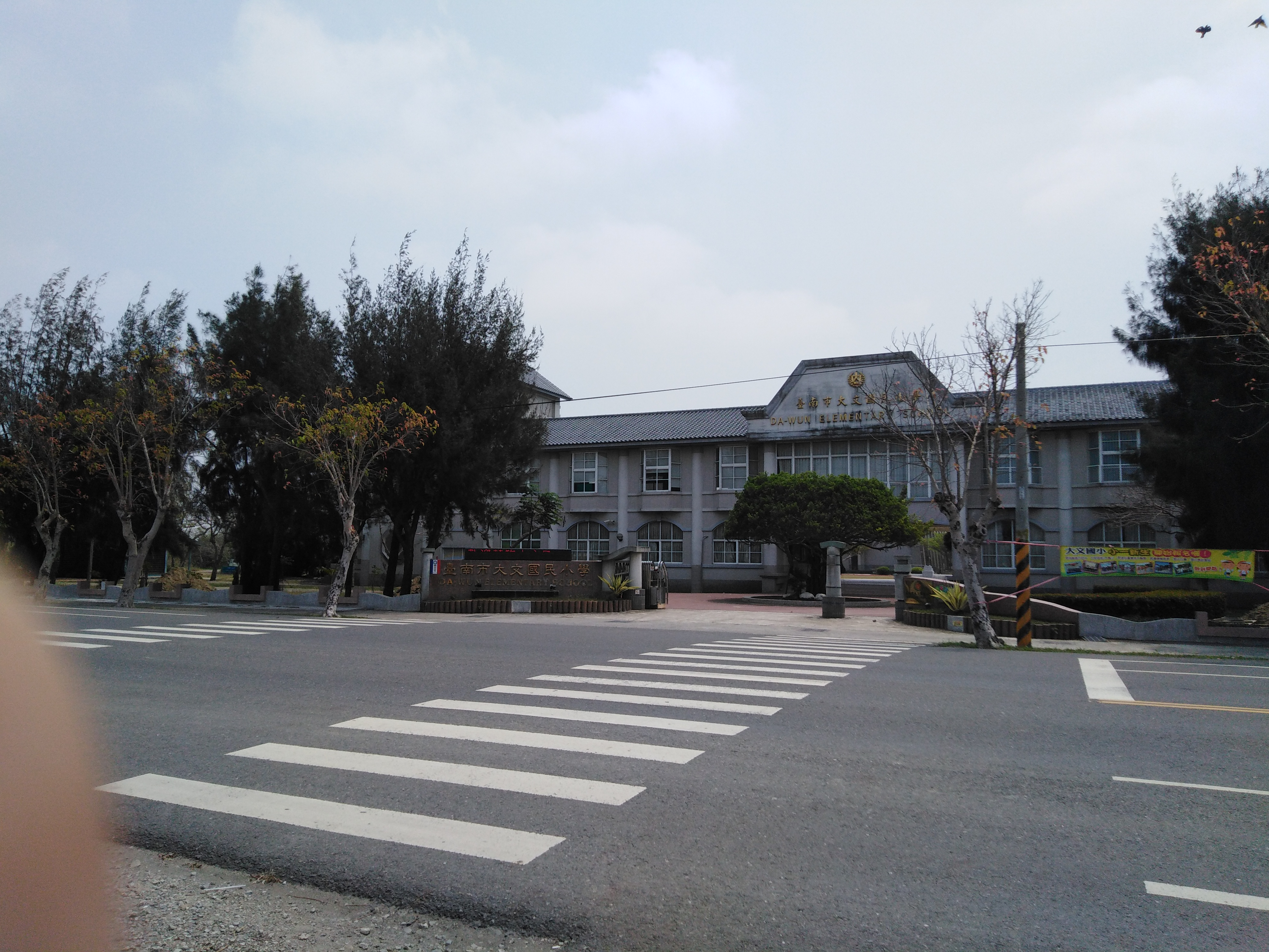 大文國小校門口